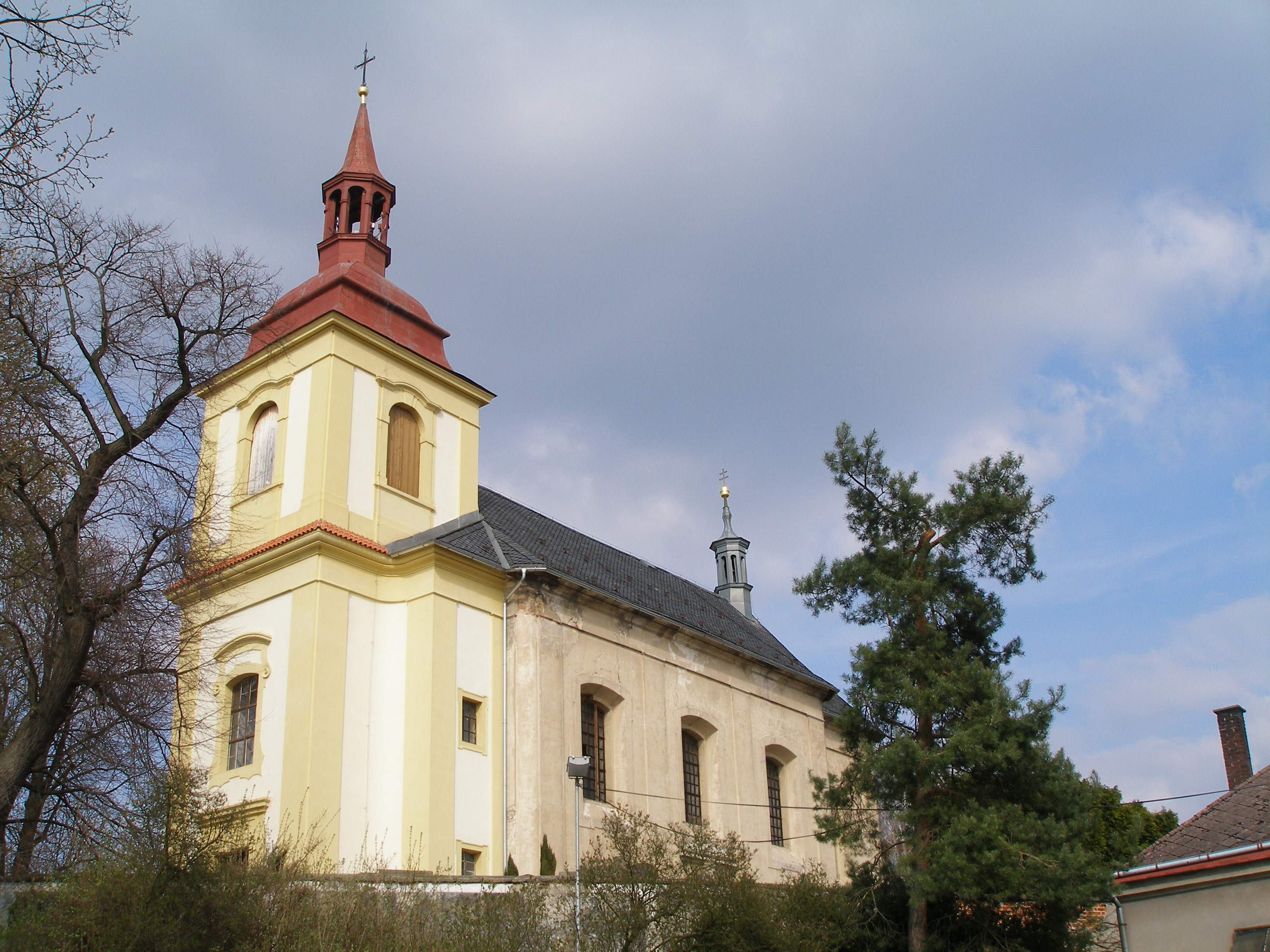 Kostel svatého Václava v Bosni.